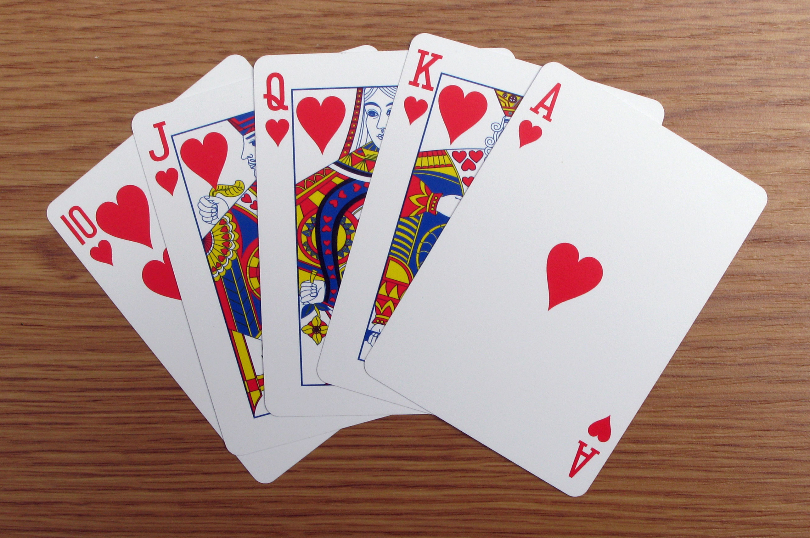 En Häerzer-Royal Flush.